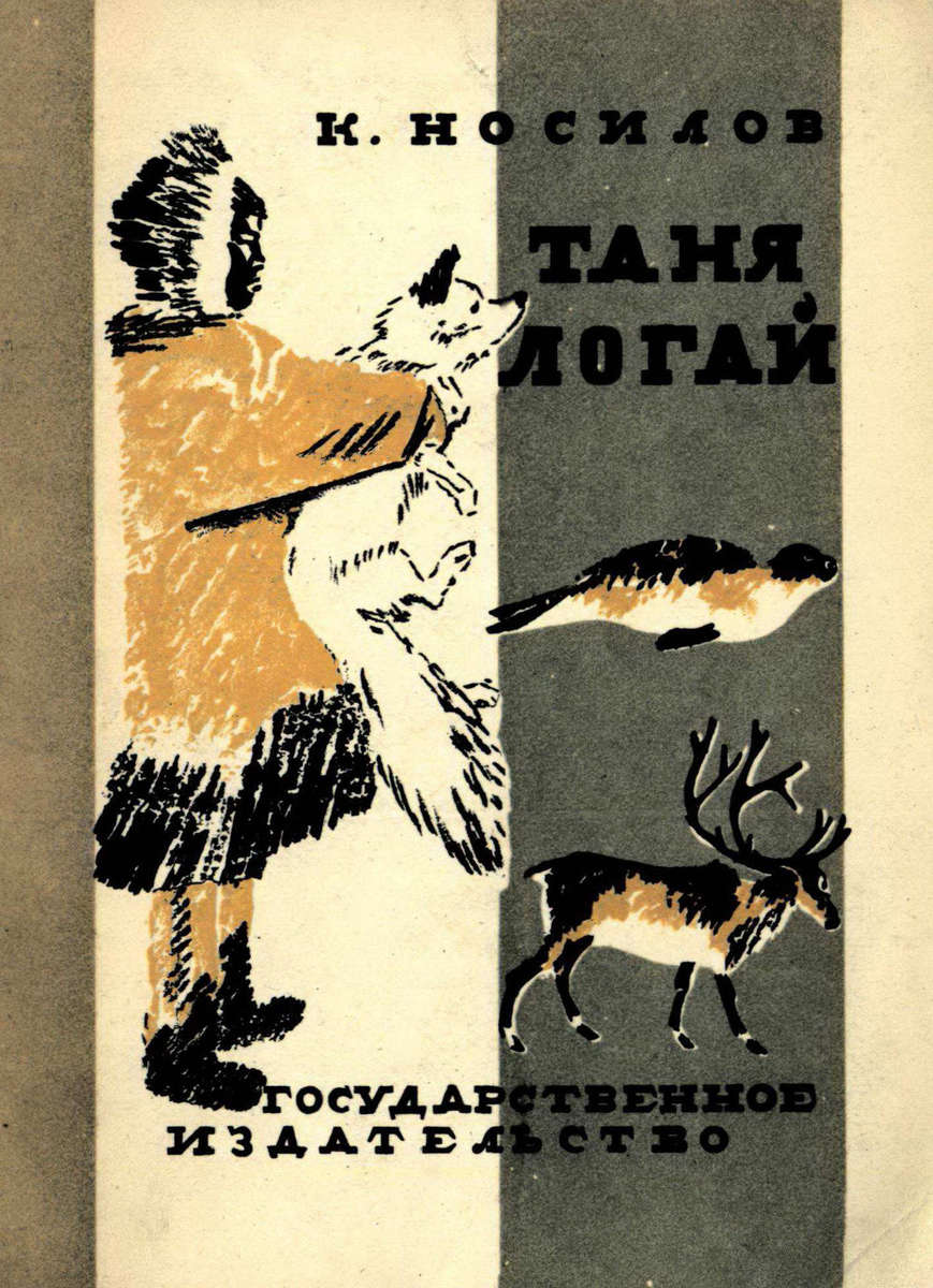 иллюстрации художника Константина Васильевича Кузнецова (1886—1943)